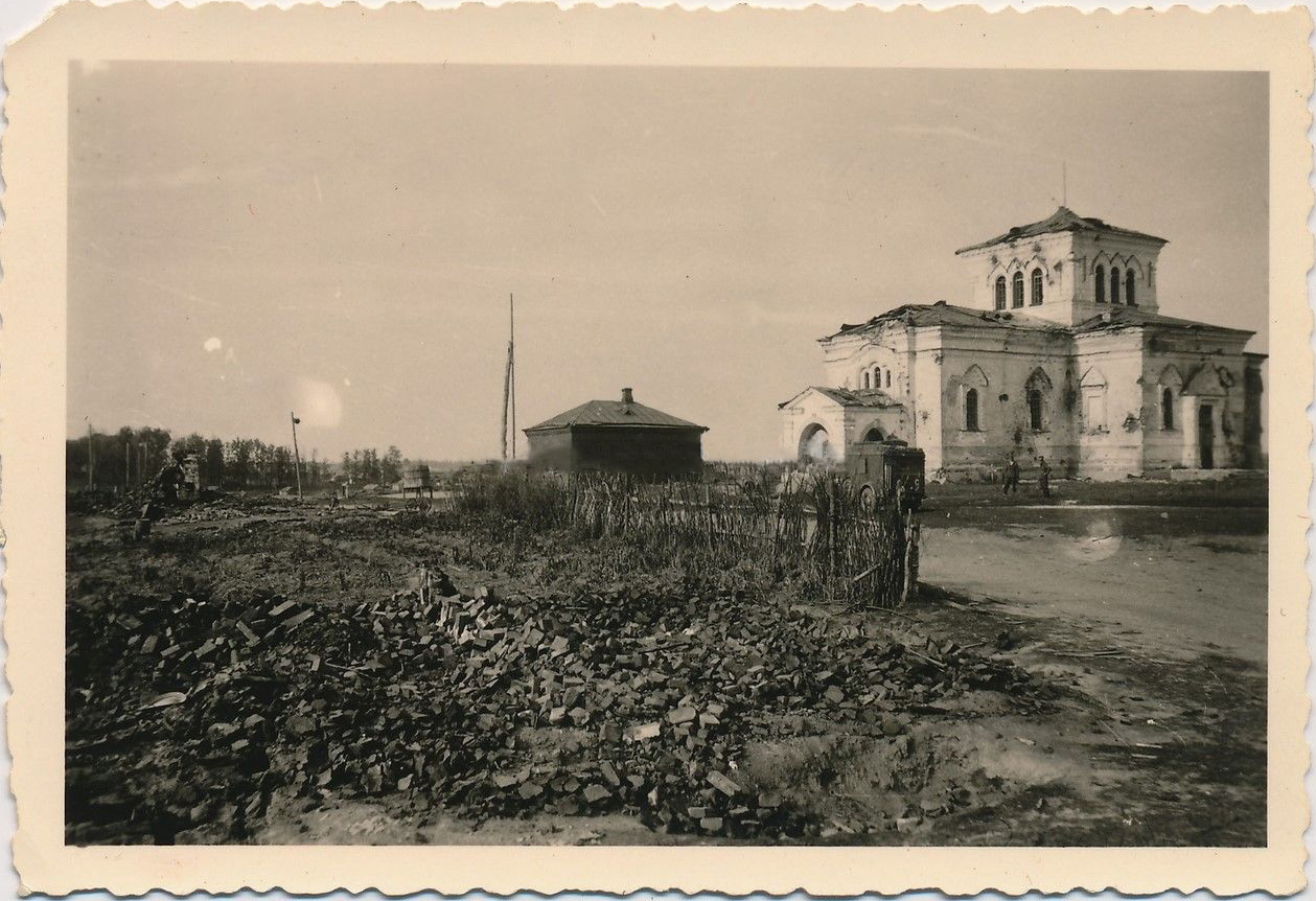 Беларуская (тарашкевіца): Мілаславічы (Miłasłavičy). Царква